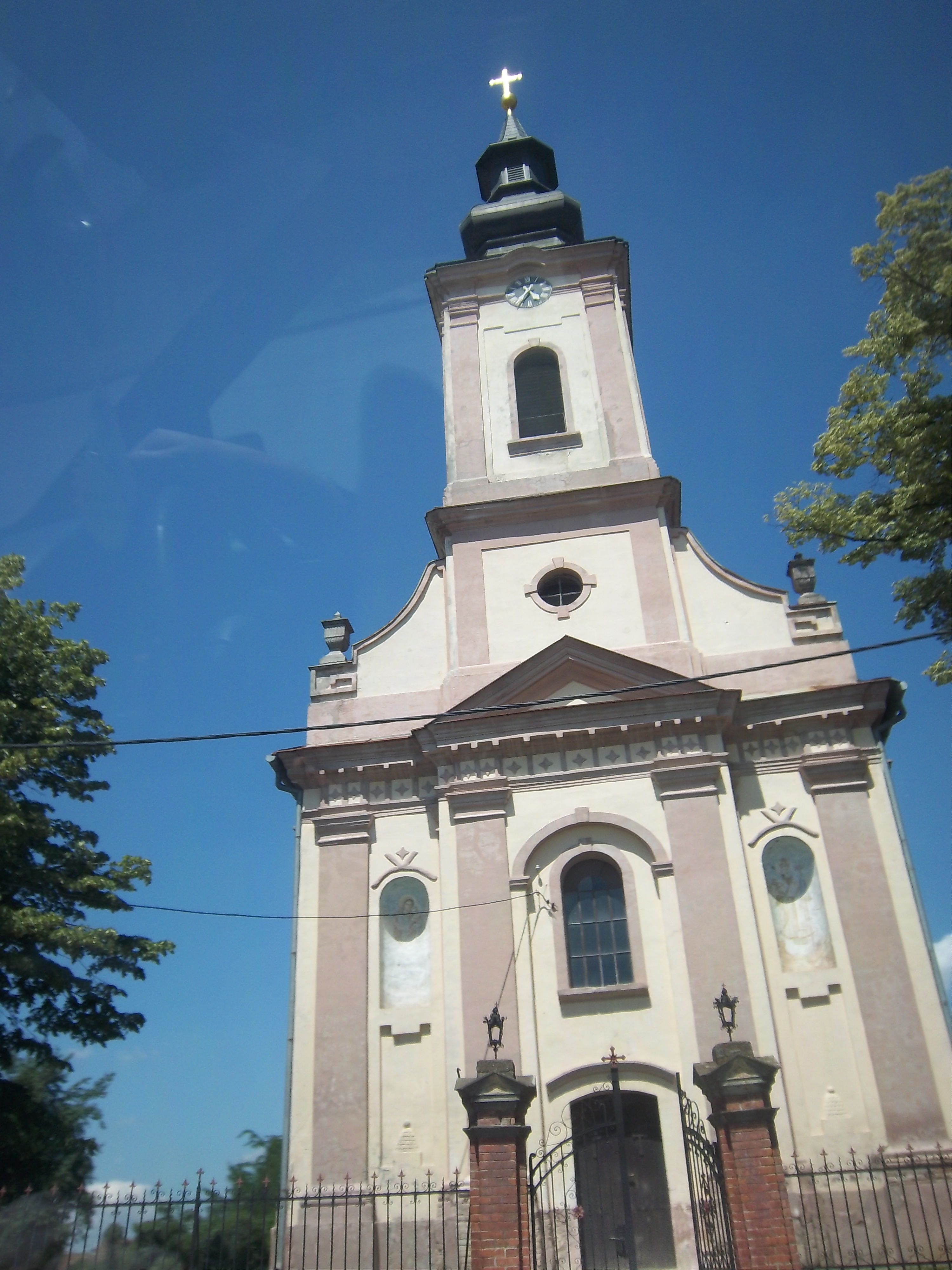 Srpskohrvatski / српскохрватски: Pravoslavna crkva u Mirkovcima, Republika Hrvatska